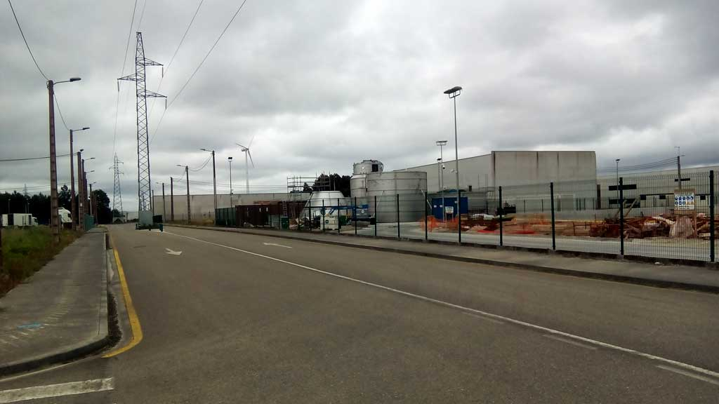 Polígono de Sete Pontes, Vilalba.